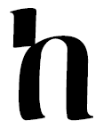 Каф эфиопский